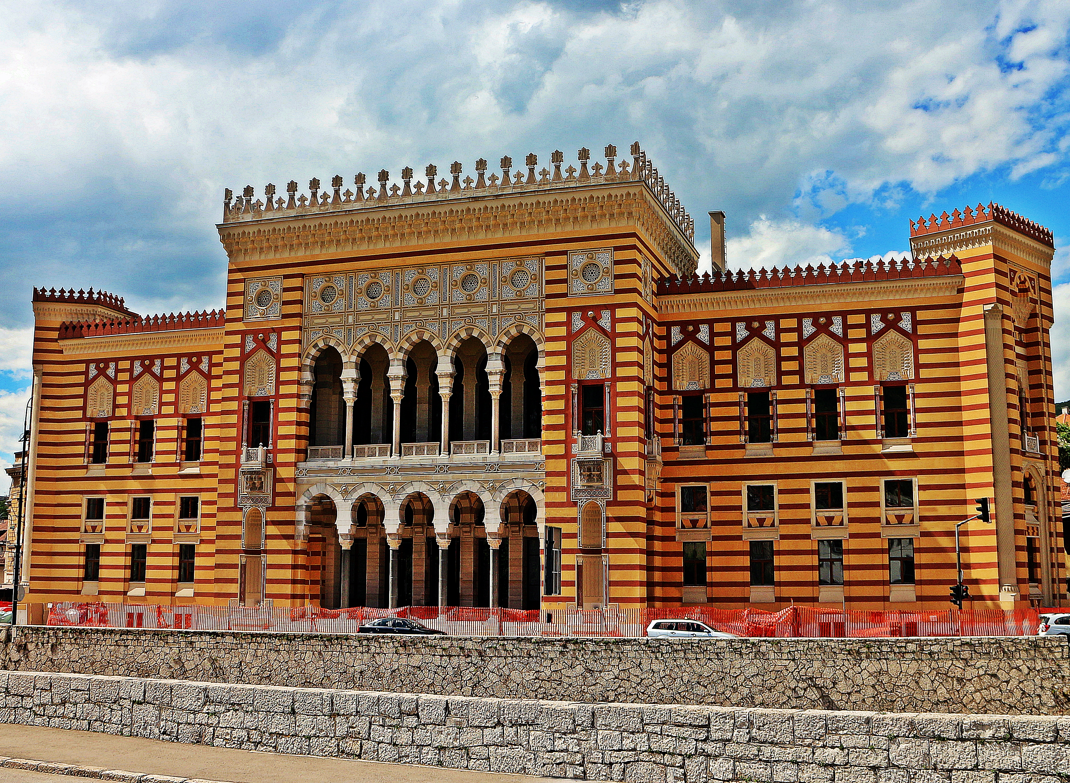 Stari Grad Sarajevo, Sarajevo, Bosnia and Herzegovina